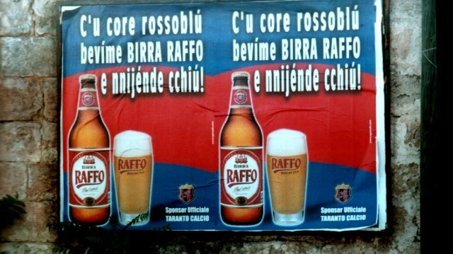 Manifesto in tarantino ed italiano